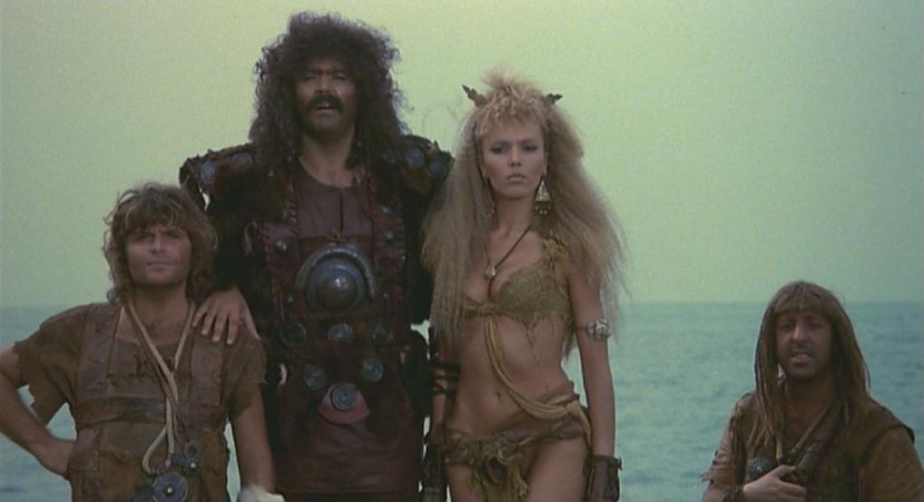 Screenshot del film Attila flagello di Dio (1982)